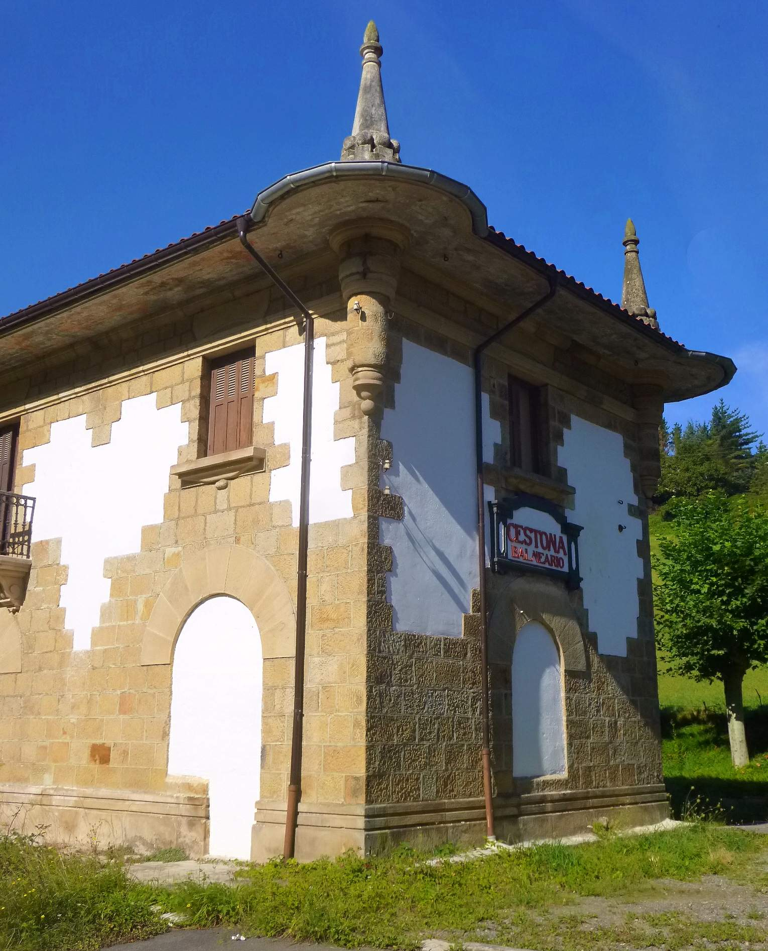 Antigua Estación del Balneario de Cestona (Gipuzkoa)